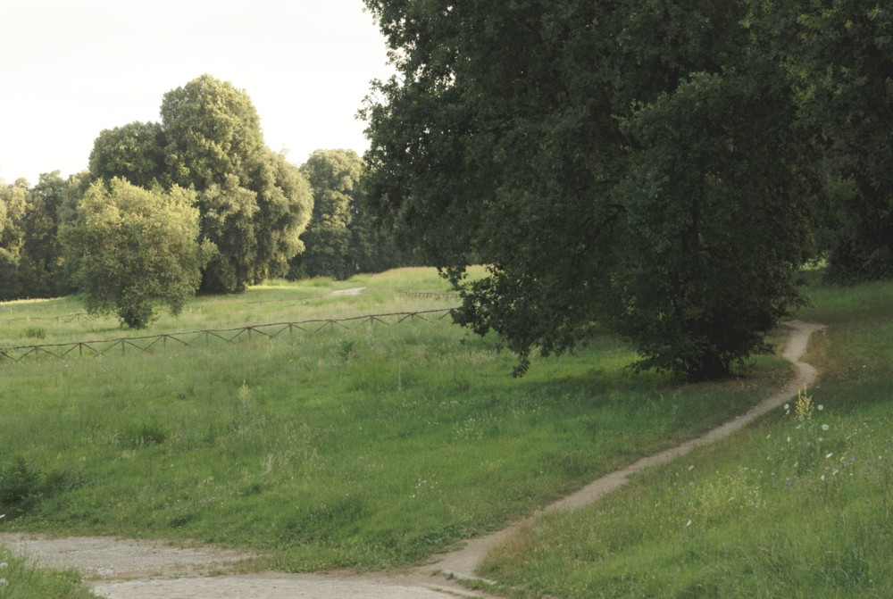 Uno dei tanti sentieri che si inoltrano nel Parco di Capodimonte